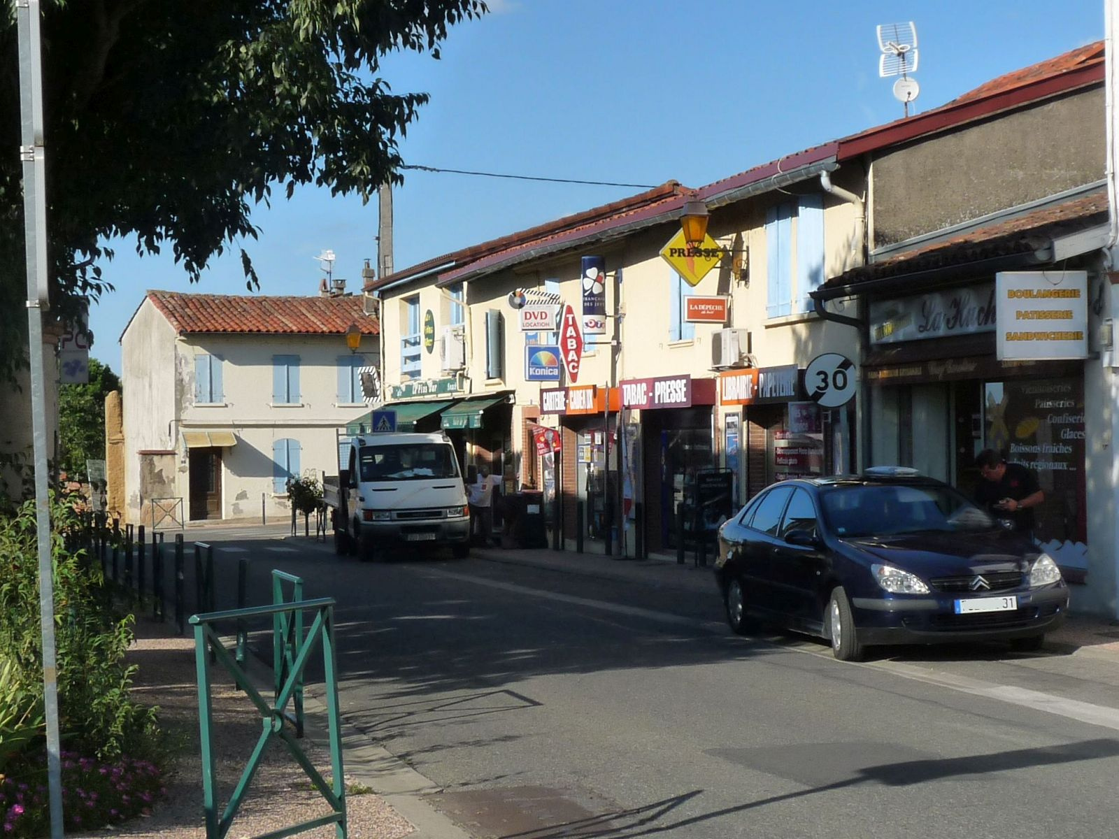 Avenue de Vilate, Pins-Justaret, Haute-Garonne, France